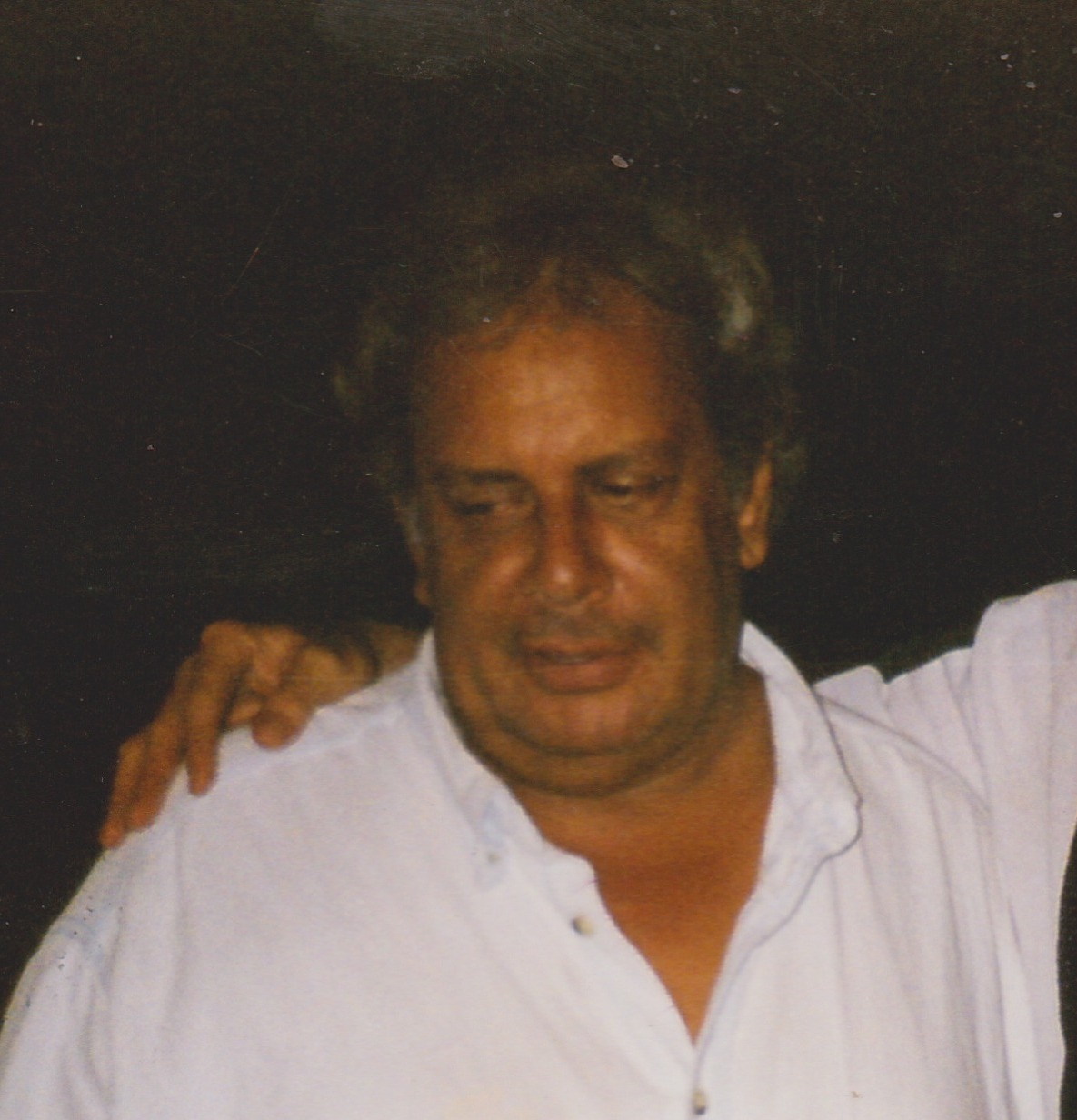 Esto es en Cuba, en casa de Raúl